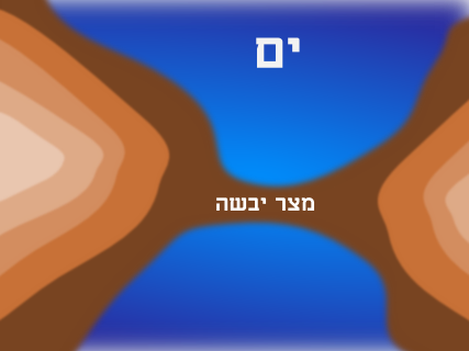 תיאור סכמטי של מצר יבשה